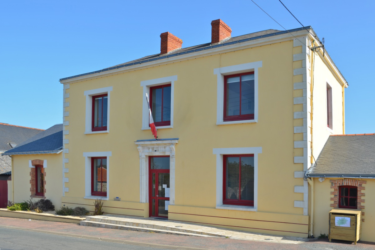 Mairie de Corcoué-sur-Logne (Loire-Atlantique)